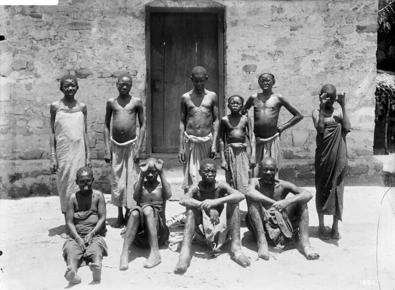 Leprakranke aus dem Lepraheim Bagamojo